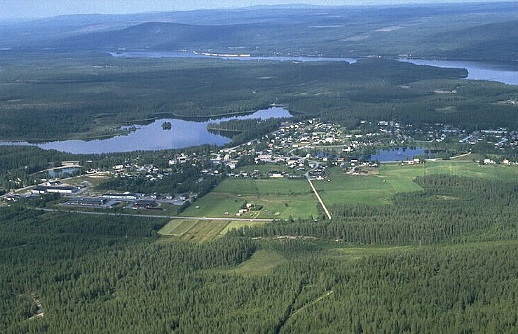 Motiv: Vuollerim Nyckelord: Flygbilder, Riksintressen Kategori: JordbruksbyVuollerim